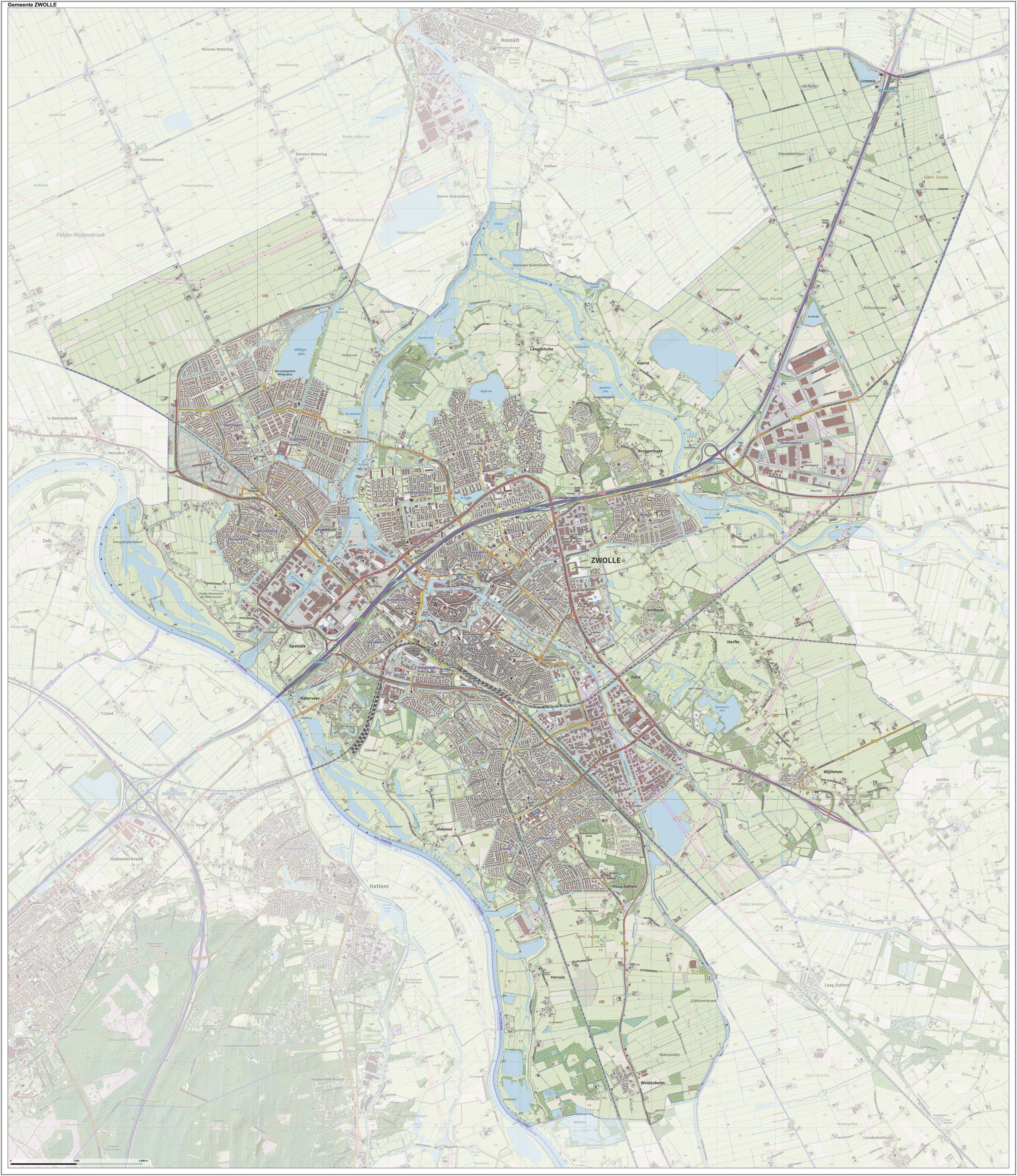 Topografische gemeentekaart per september 2014. Resolutie: 400 pixels/km. Kaartbeeld samengesteld uit de open geodata van de Top10NL en Top25namen (Kadaster), Creative Commons-BY licentie. Gebouwvlakken uit open geodata BAG extract. Wegen uit de OpenStreetMap, OpenStreetMap community. Reliëfschaduw uit de Actuele Hoogtekaart AHN2. Samenstelling en kleurenschema: Jan-Willem van Aalst, met QGIS. Zie ook de Legenda.